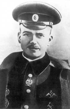 Пётр Николаевич Нестеров